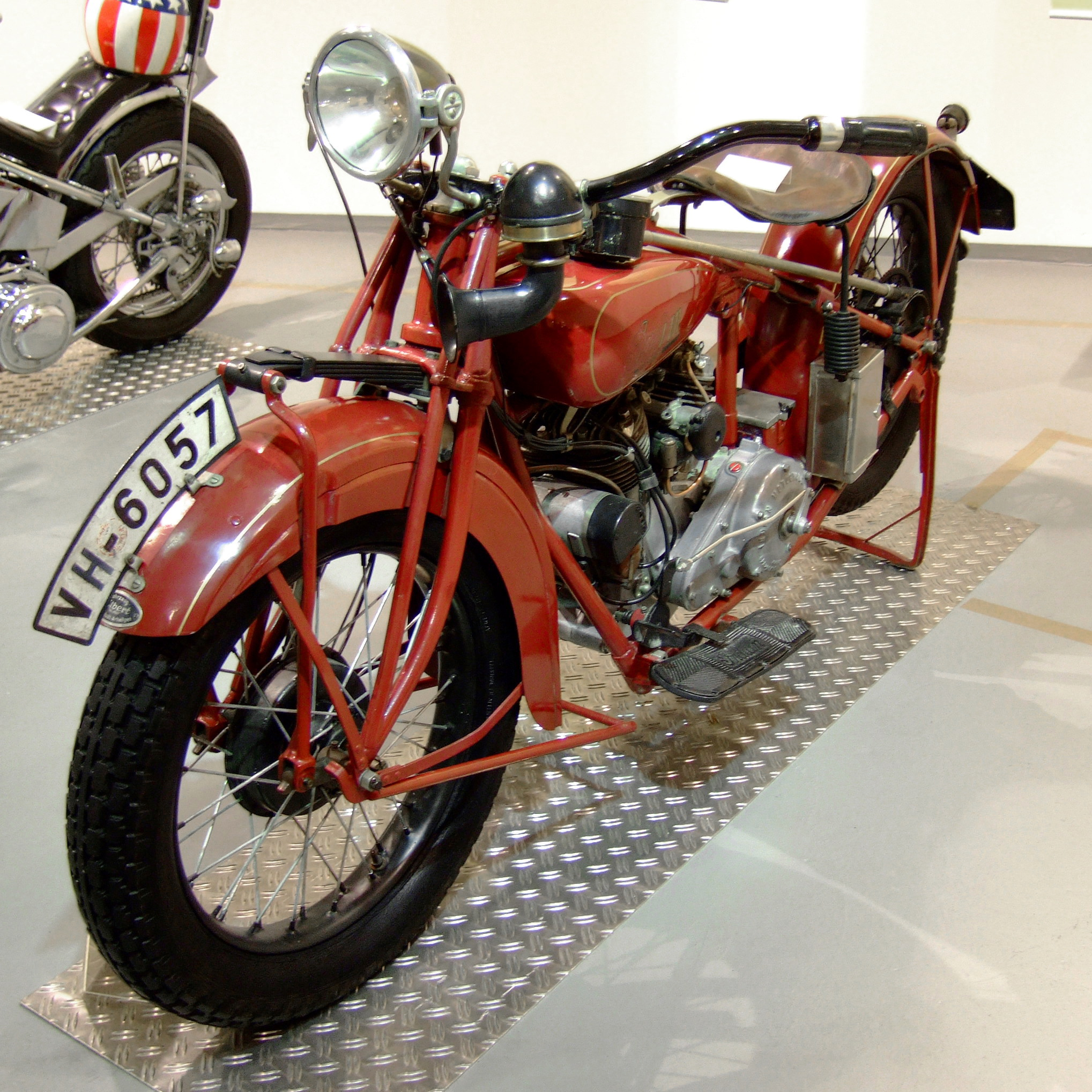 Motorbike "Indian Scout" (1929) at the Deutsches Zweirad- und NSU-Museum (746 cm³, 16 PS bei 4.000 U/min., 110 km/h)